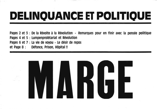 Extrait de la première page de couverture du n°9 du journal "Marge".